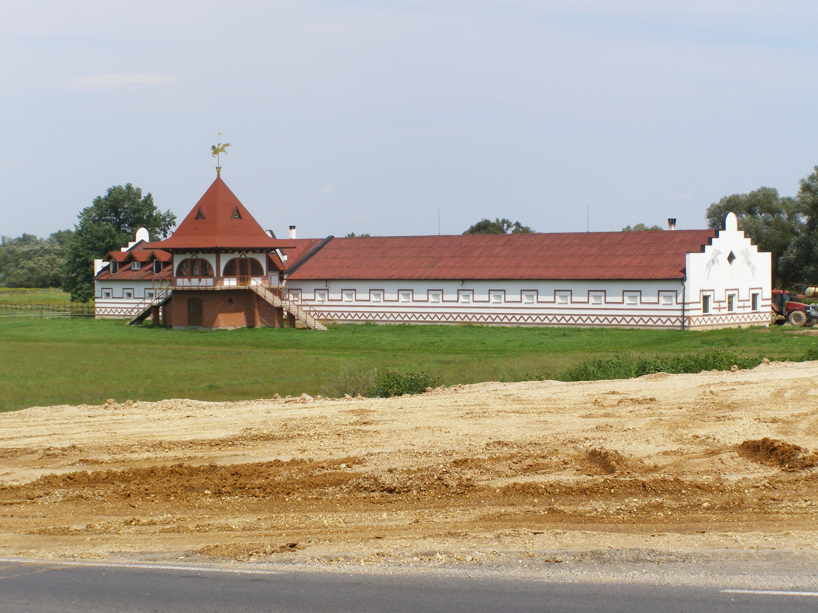 Nádasd-Hegyalja, Hungary